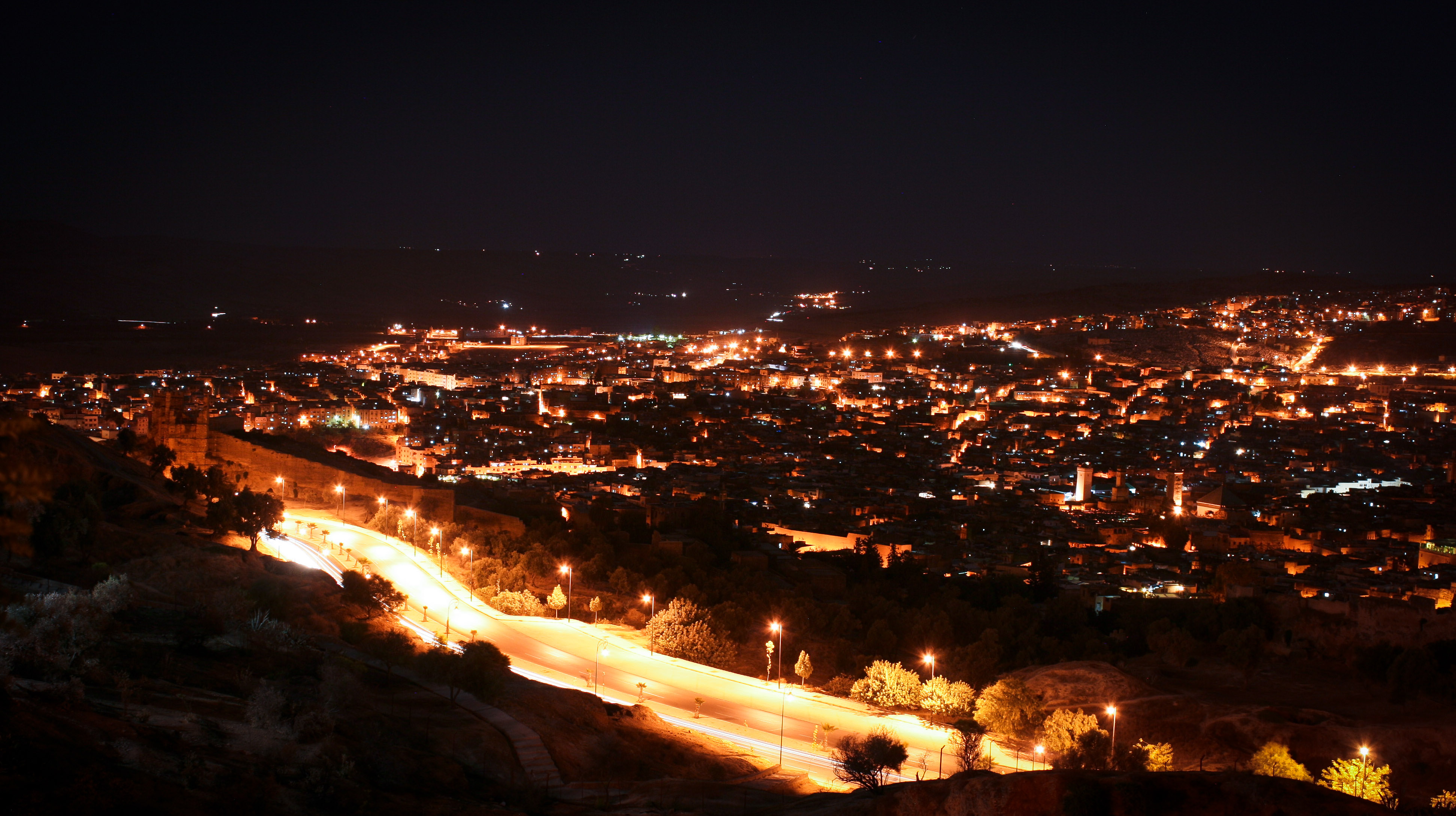 Vue panoramique sur l'antienne Medina